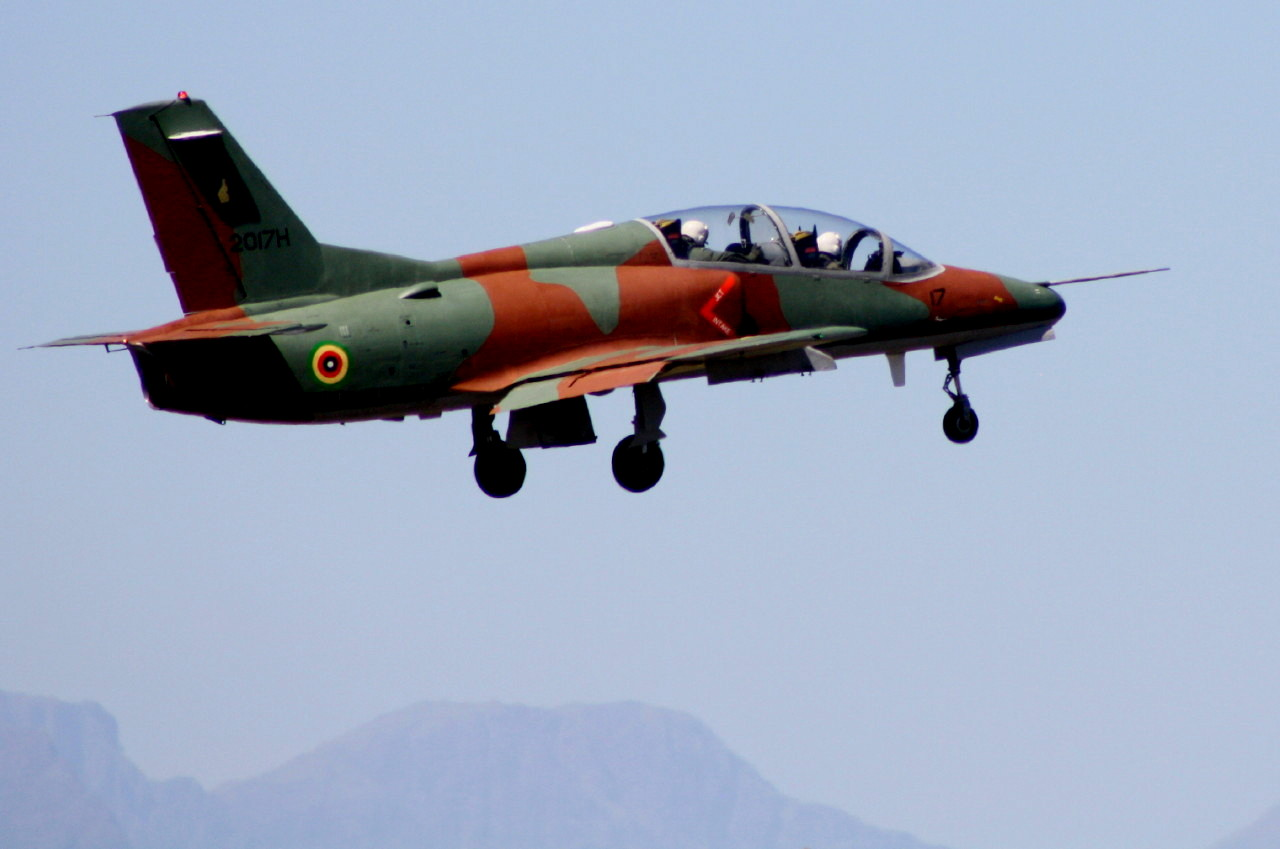 Zimbabwe AF K-8 2017H